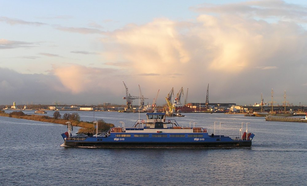 Distelwegveer, onderweg van de Distelweg in Amsterdam-Noord naar de Tasmanstraat. Foto november 2005.